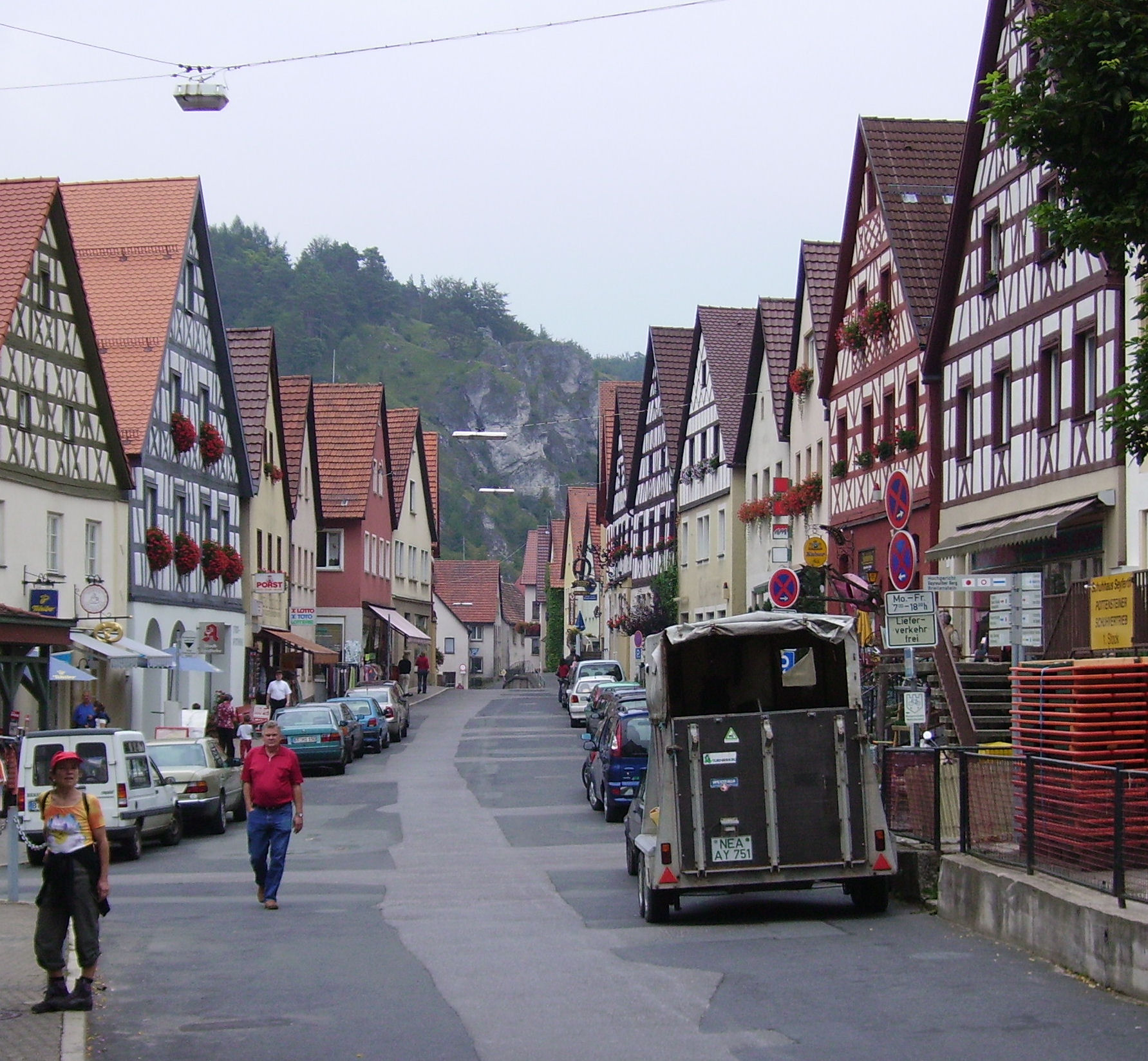 Pottenstein Franconia (Bavaria, Germany)